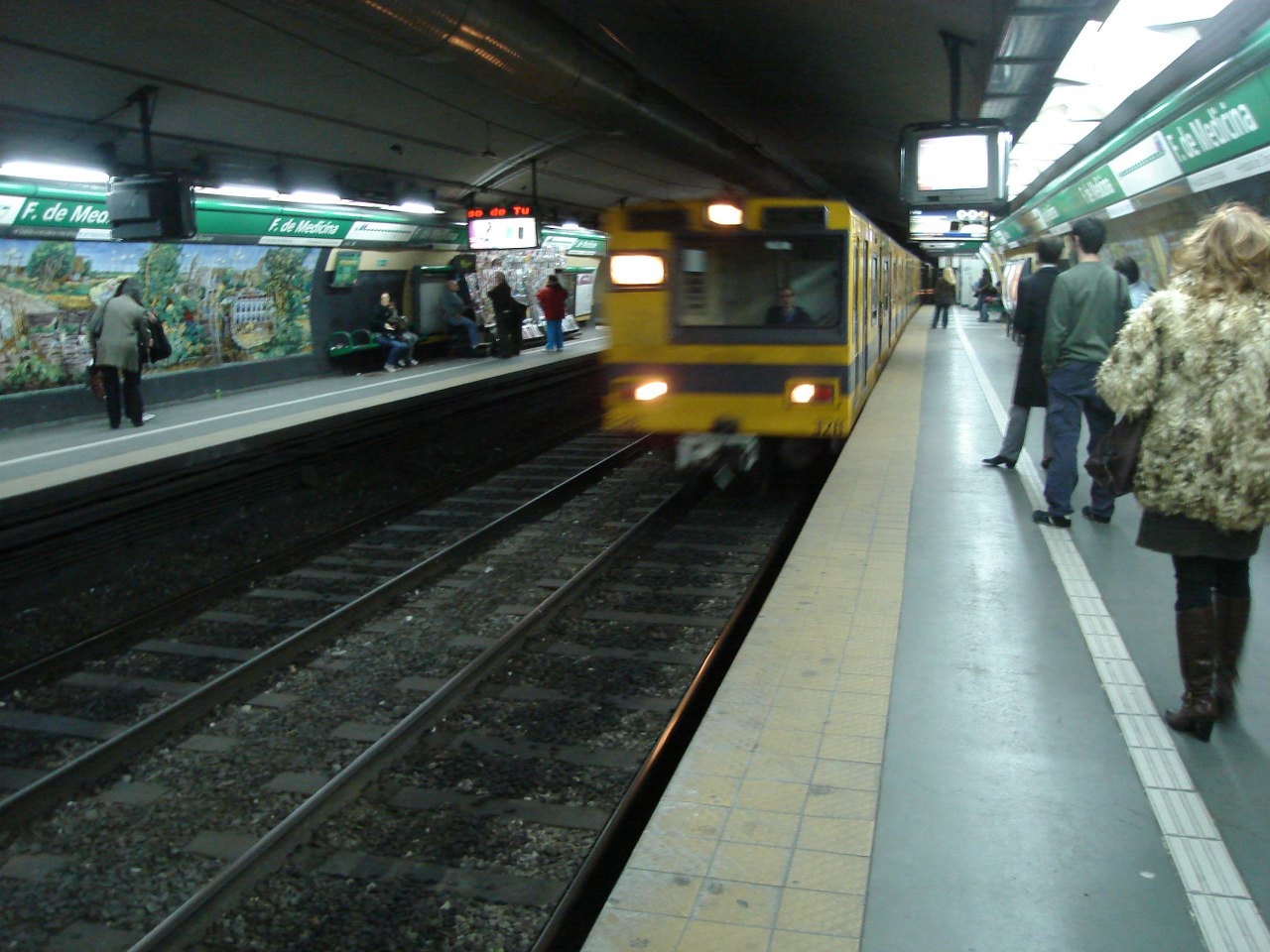 Materfer entrando en Facultad de Medicina